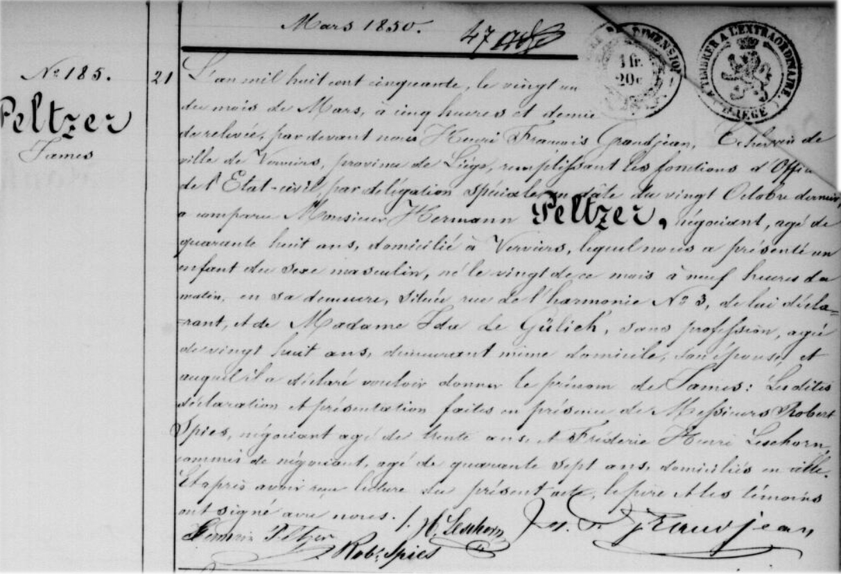 ADN - James Peltzer - Verviers - 20 mars 1850